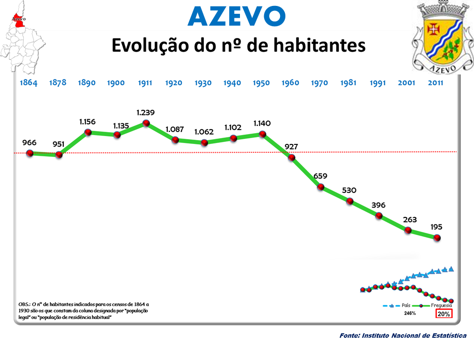 Censos 1864/2011